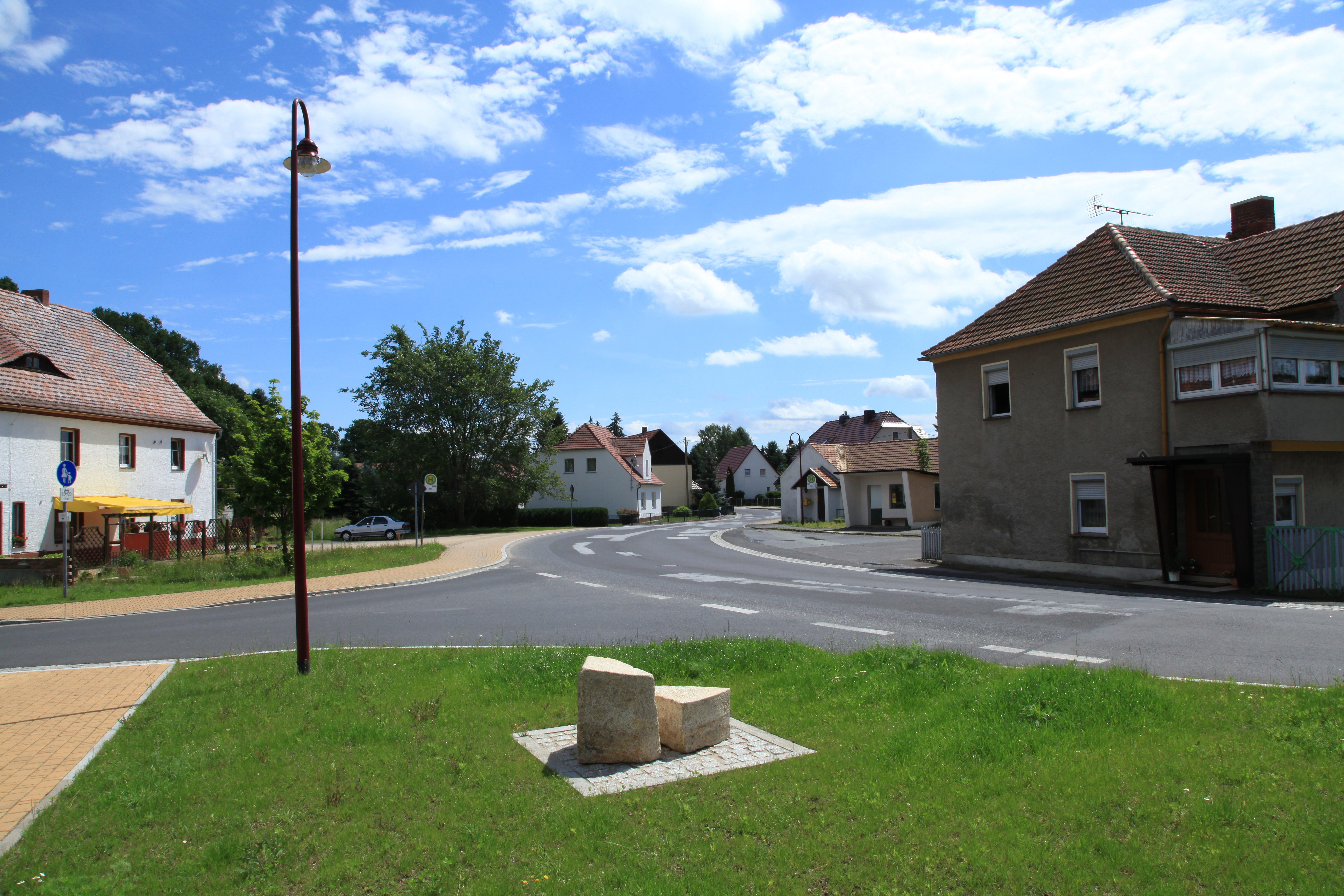 Ecke Seer Straße (rechts)/ Jäcklein-Rohrbach-Straße (links) in Sproitz, Quitzdorf am See